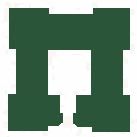 Schemazeichnung eines urataeischen Turmtempels